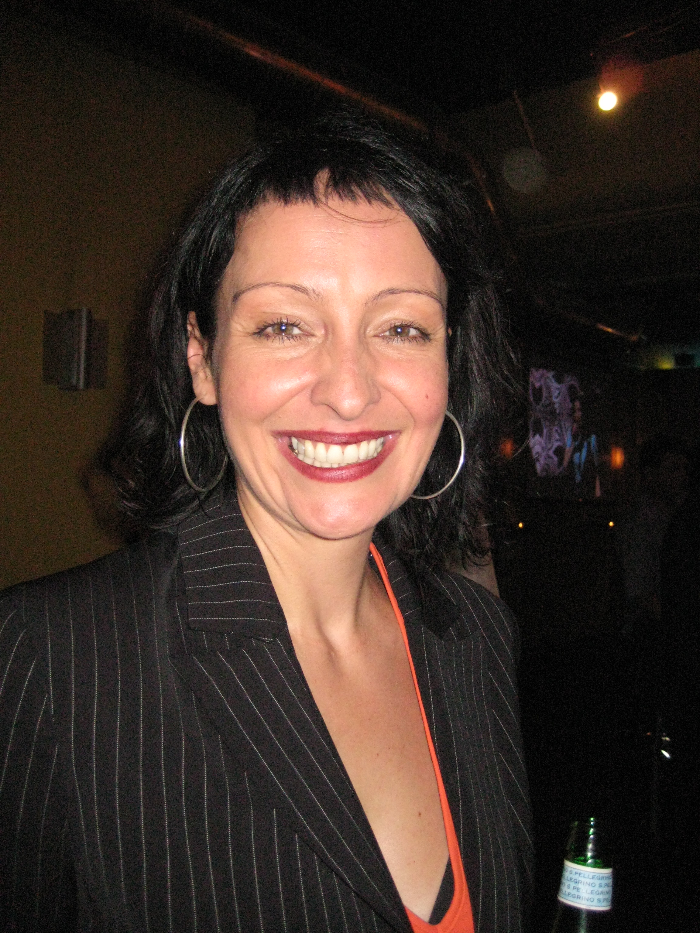 Lange Nacht der Musik am 13. Mai 2007 in München: Susanne Brantl